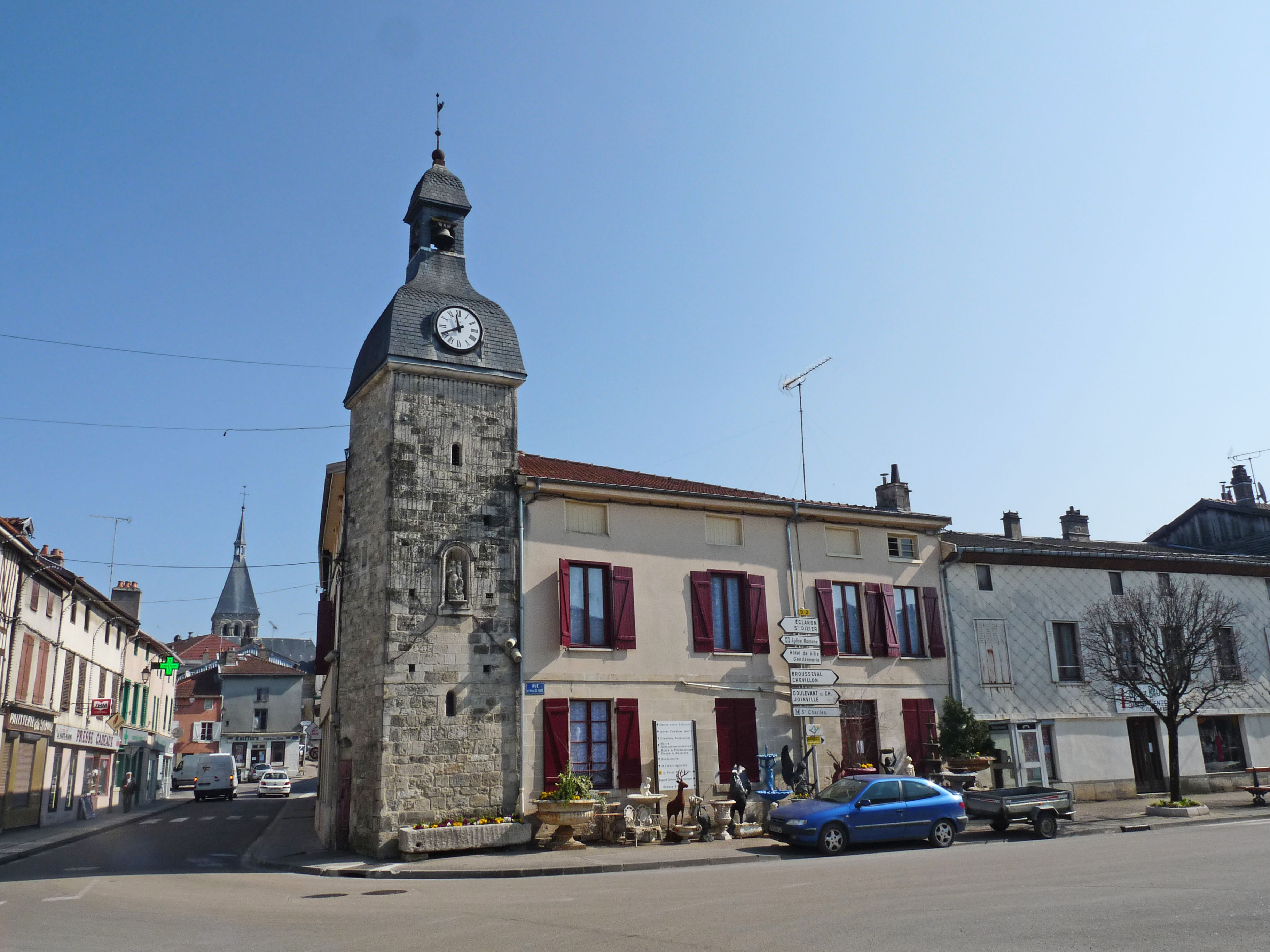 Tour du Dôme à Wassy (Haute-Marne). Classée MH en 1933.